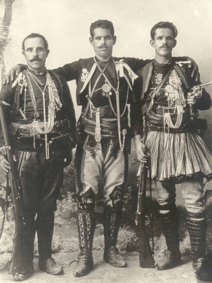 Димитър, Лазар и Гоно Дояма.